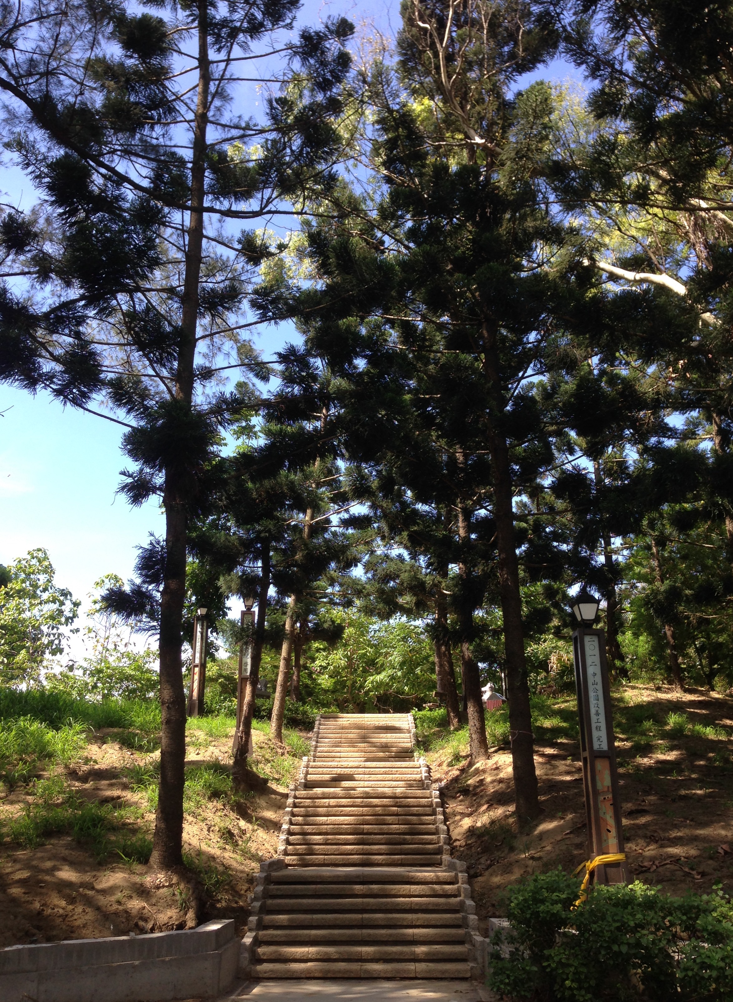 佳里中山公園土丘與參道